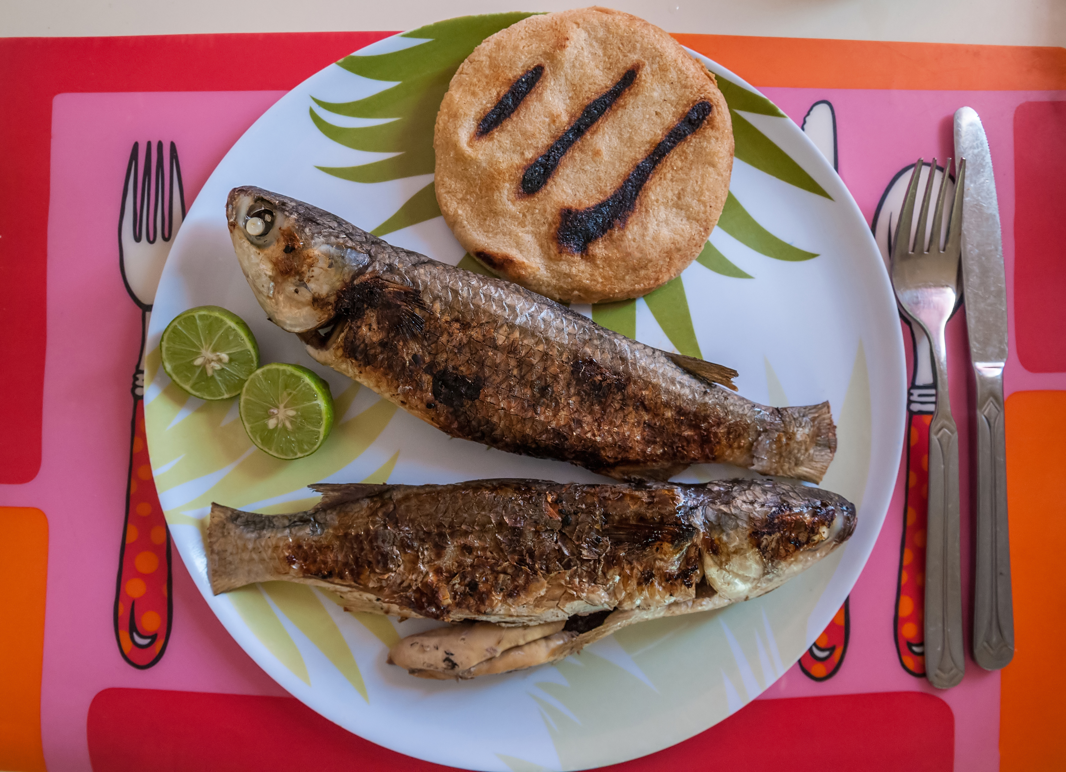 Pescado Lisa con Arepa, Comida Margariteña